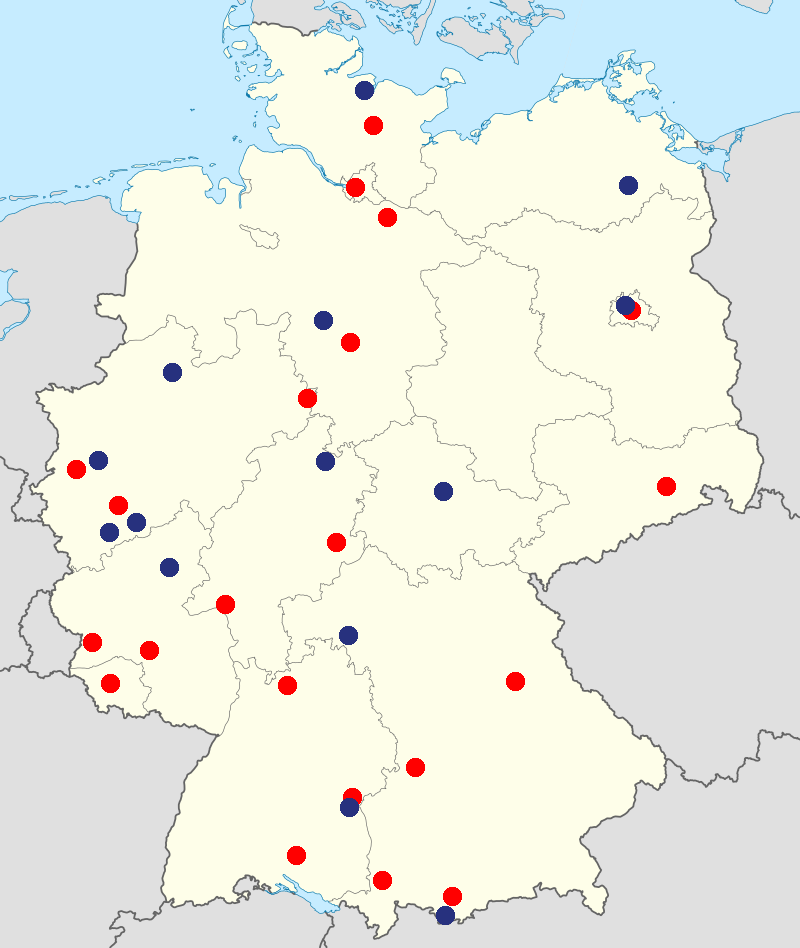 Deutschland - Militärmusik (gesamt)